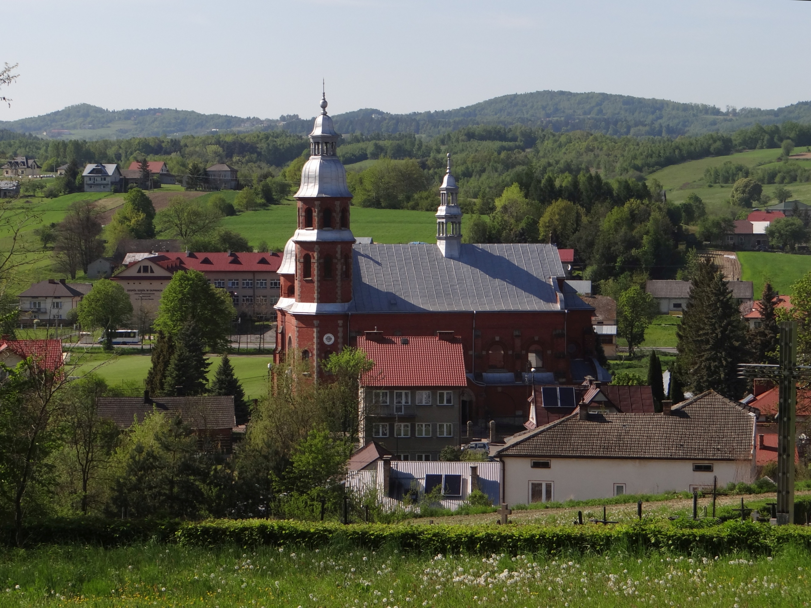 Ołpiny